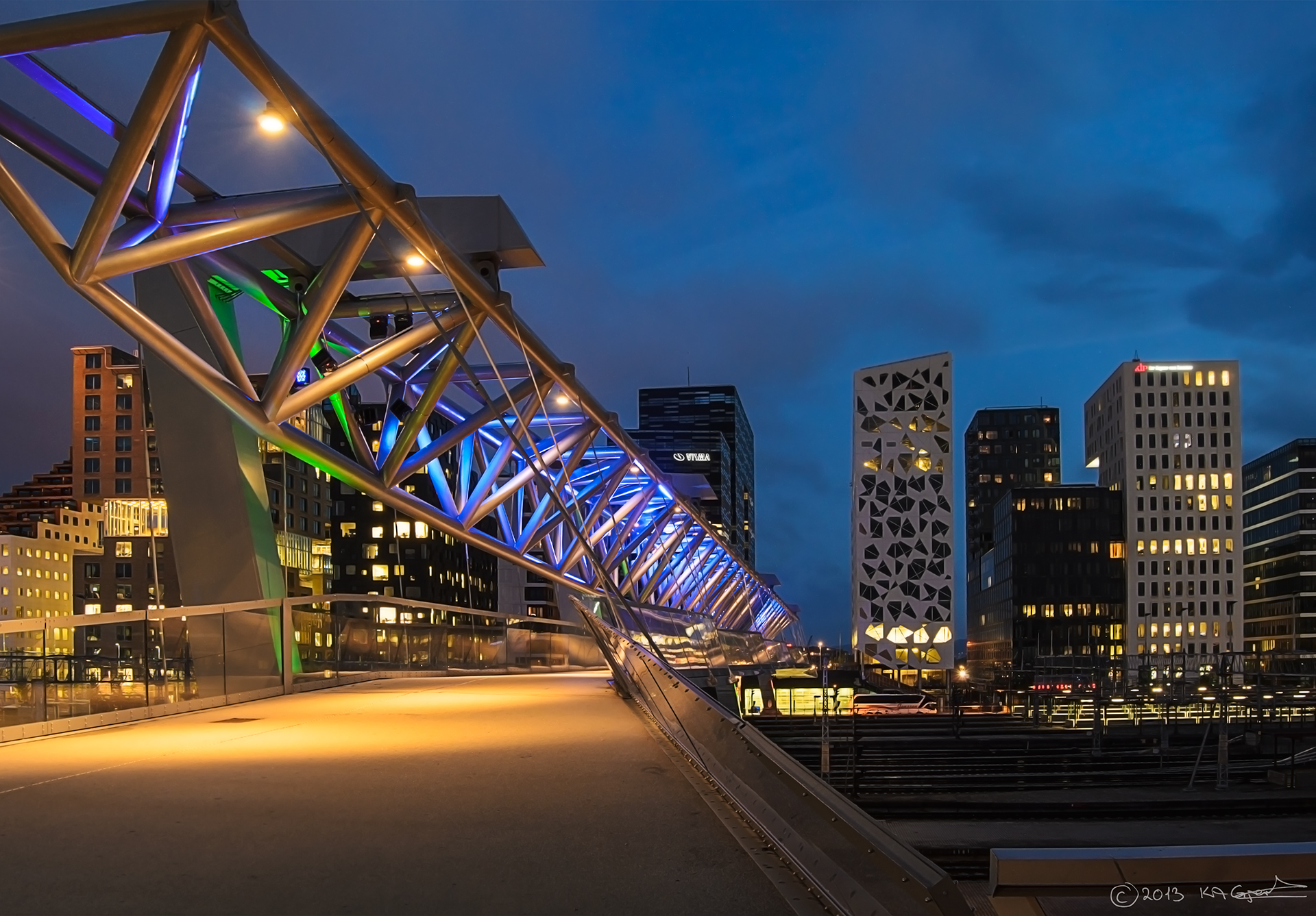 Akrobaten gang- og sykkelbro i Oslo fotografert i den blå timen